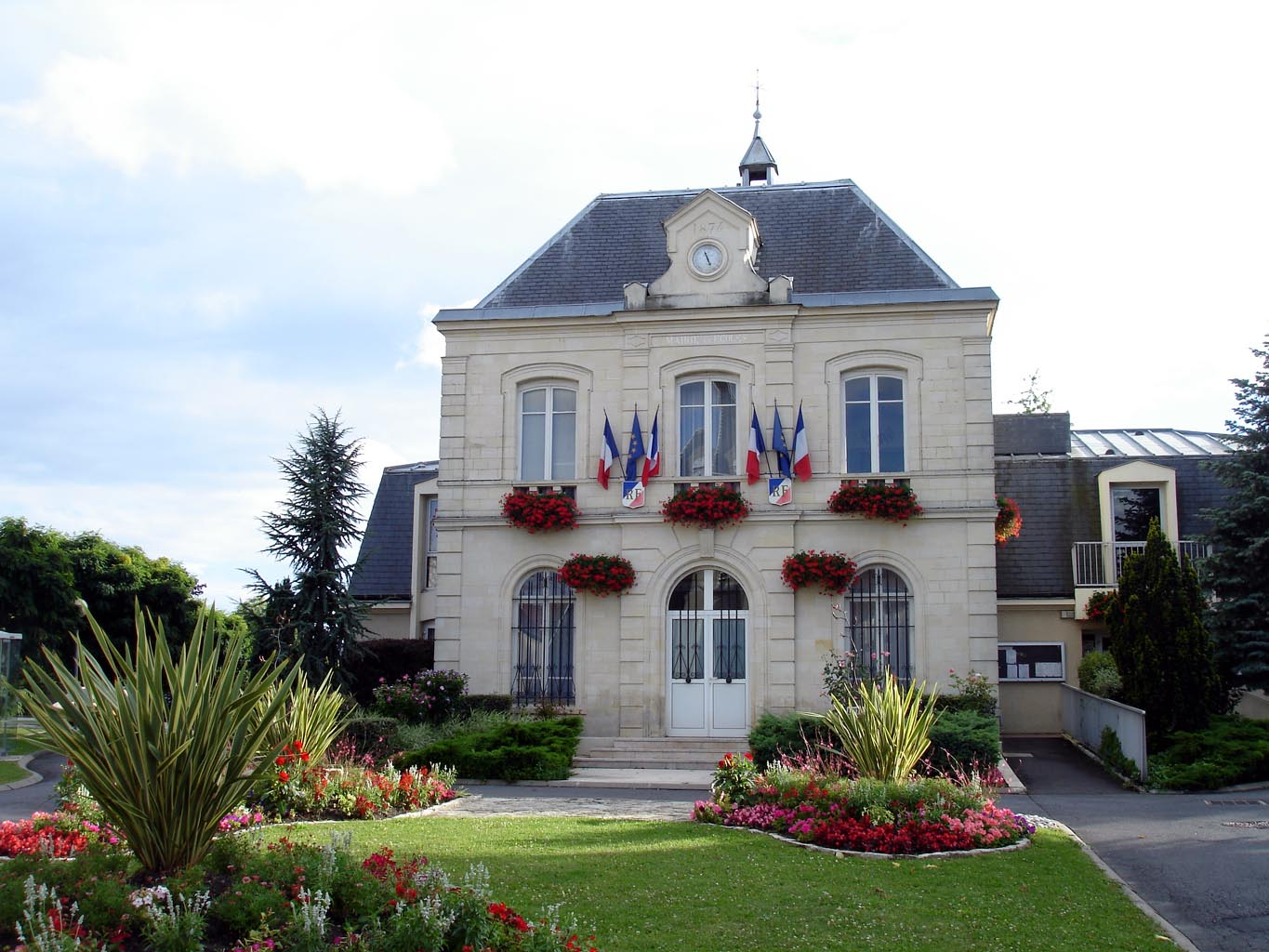 La mairie du Plessis-Bouchard (Val-d'Oise), France